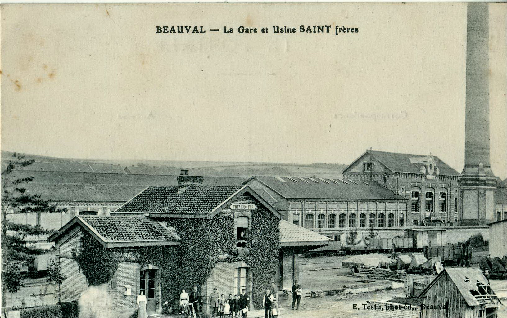 carte postale ancienne éditée par TestuBeauval : la Gare (des Chemins de fer départementaux de la Somme) et l'usine SAINT Frères